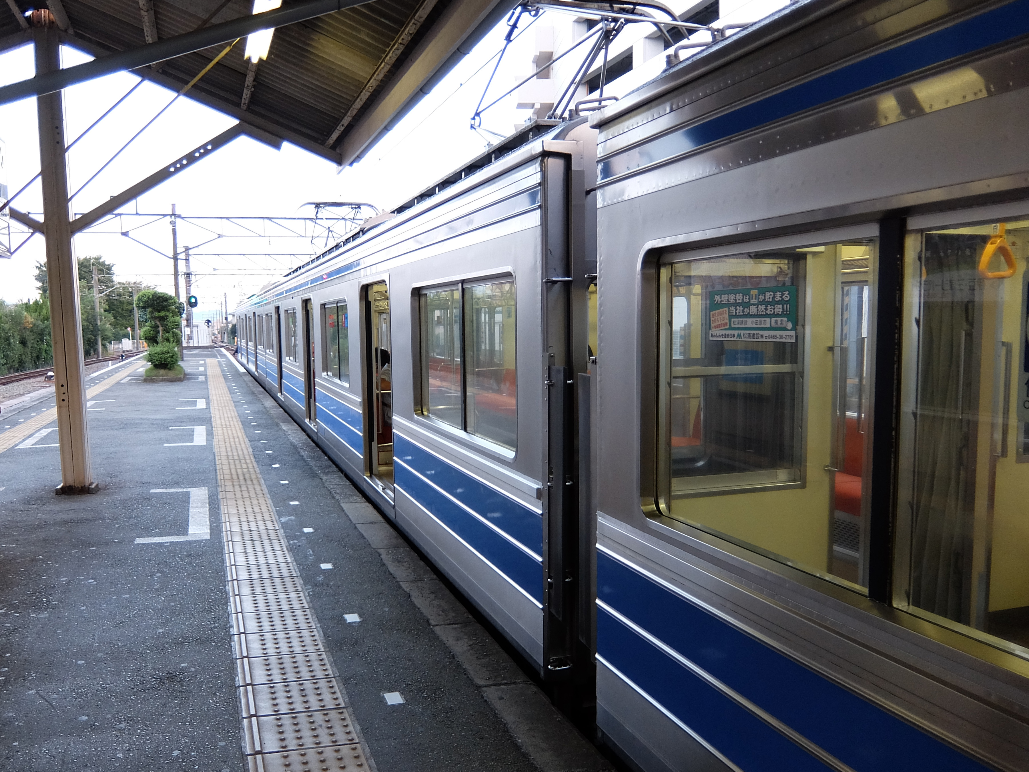 伊豆箱根鉄道 大雄山駅